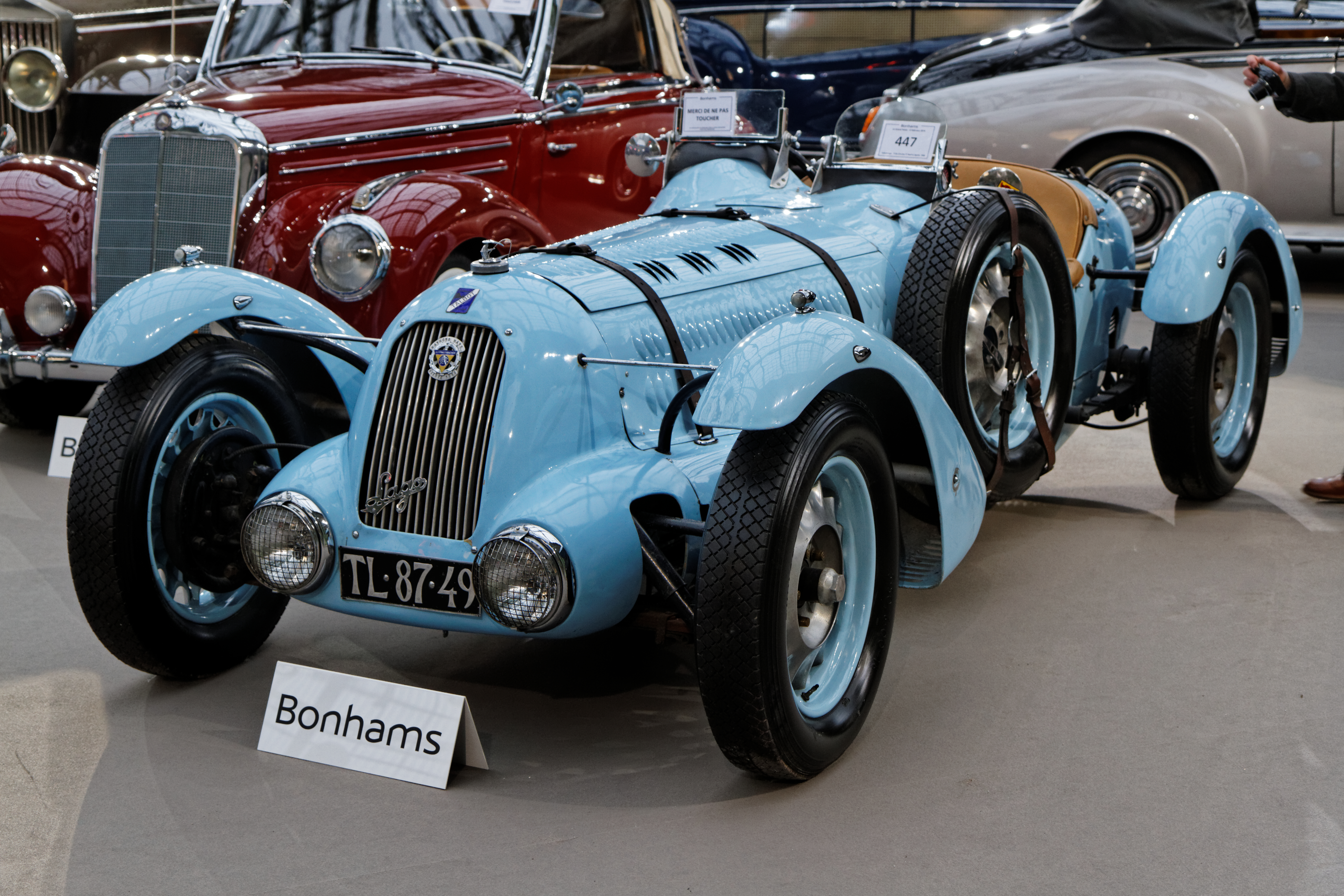 Une Talbot-Lago T120 3.0 Litre Replica Sport au Grand Palais lors de la vente Bonhams en février 2014.